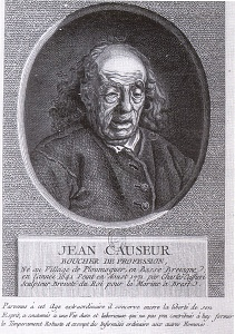 Jean Causeur, boucher de profession. XVIIIe siècle - 1772. Burin et eau-forte. (Jean Causeur était un centenaire né à Ploumoguer et décédé à Plougonvelin)